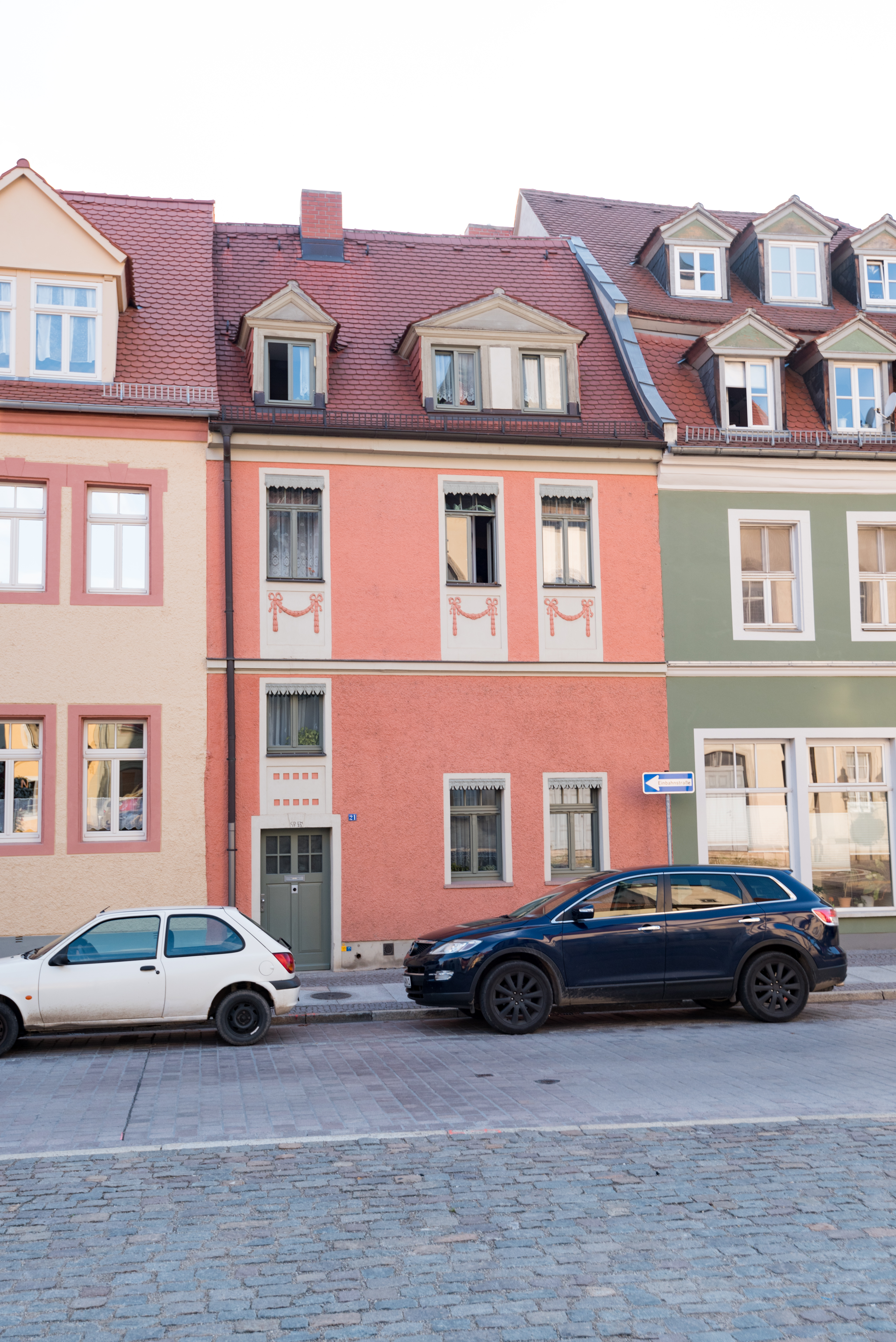 Naumburg (Saale), Marienstraße 21